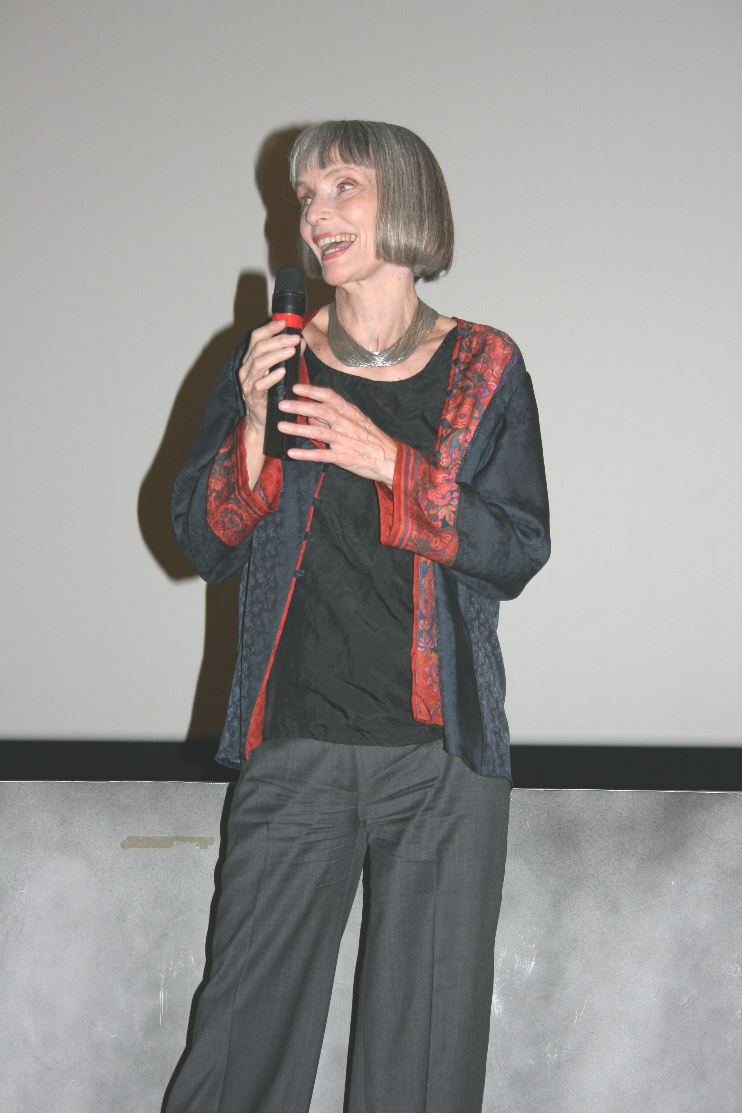 Édith Scob à l'avant-première de L'Heure d'été diffusée à l'UGC Ciné Cité Les Halles, à Paris.